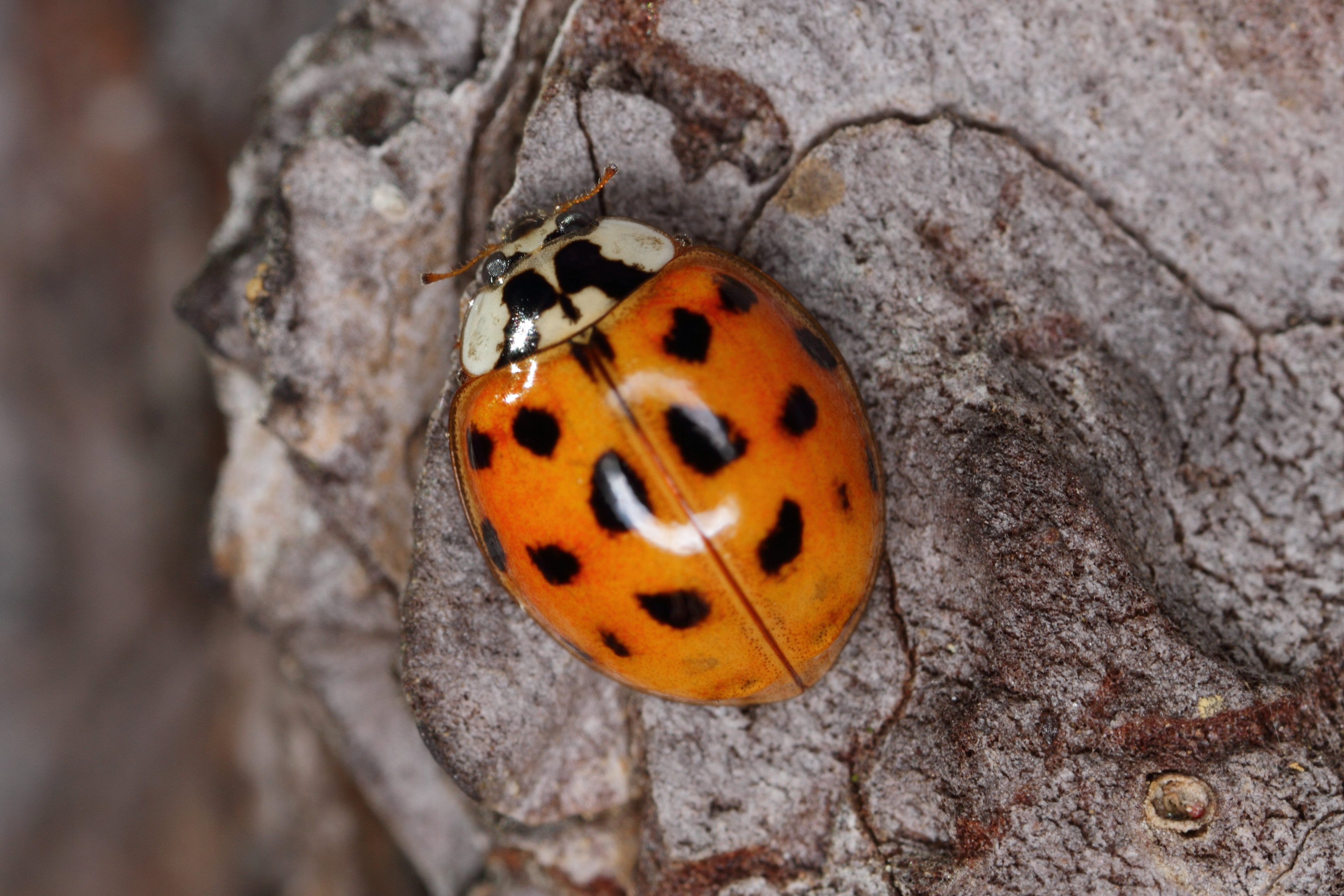 Ein Asiatischer Marienkäfer Harmonia axyridis auf einer Jeffreykiefer Pinus jeffreyi im Botanischen Garten Schönbrunns.